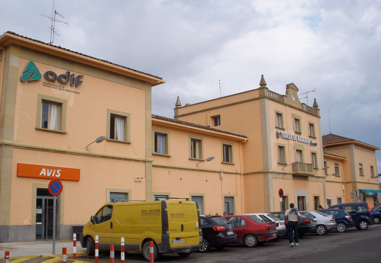 Estación de Tudela de Navarra (Navarra) - Estación de Adif.